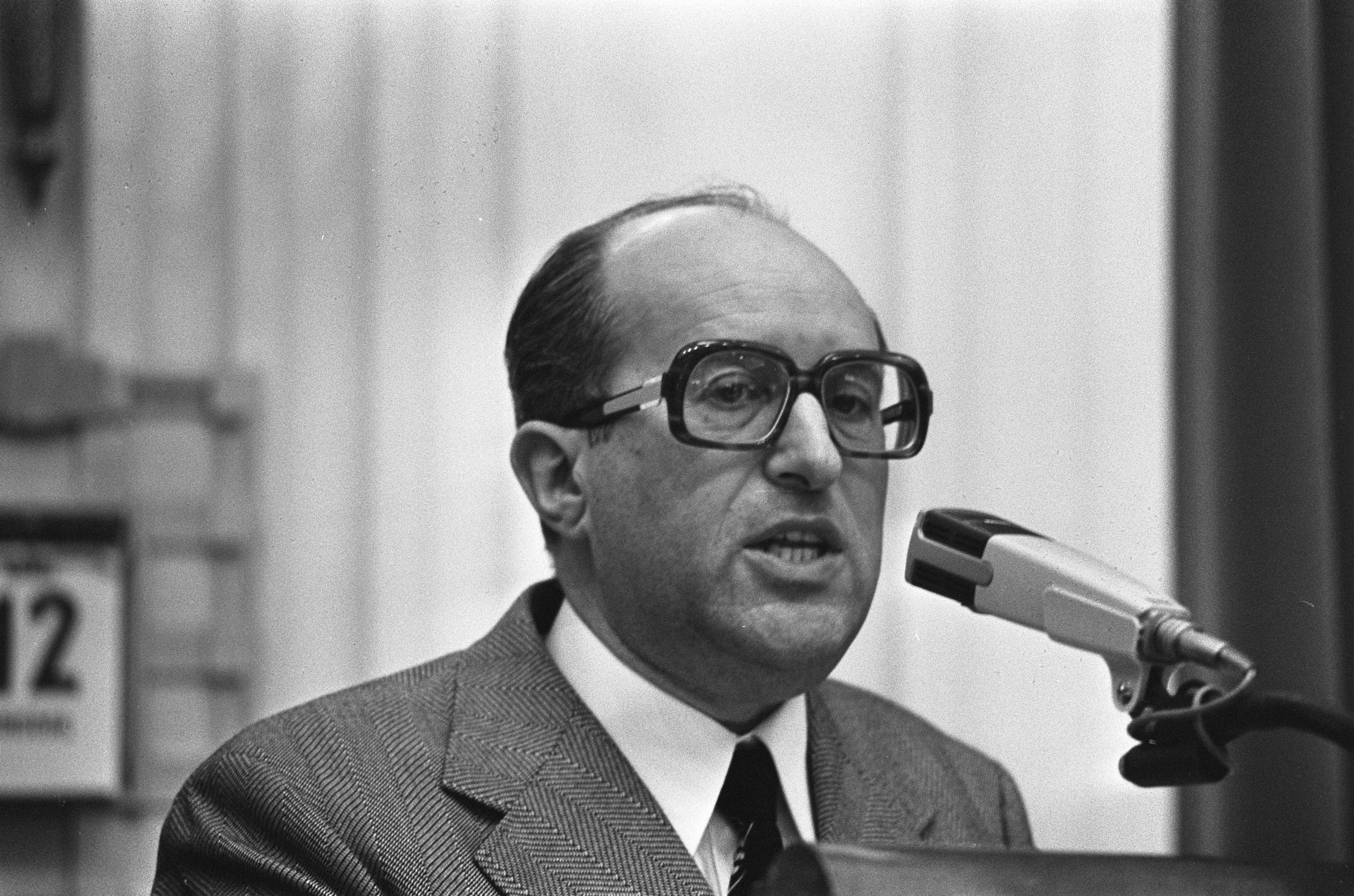 Collectie / Archief : Fotocollectie Anefo Reportage / Serie : Minister Lubbers wordt geïnterpelleerd door kamerlid Bremen (KVP) Beschrijving : Bremen (KVP) tijdens de interpellatie Datum : 12 maart 1974 Locatie : Den Haag, Zuid-Holland Trefwoorden : parlementaire debatten, parlementariërs Persoonsnaam : Bremen, W.G. Instellingsnaam : KVP Fotograaf : Bert Verhoeff / Anefo Auteursrechthebbende : Nationaal Archief Materiaalsoort : Negatief (zwart/wit) Nummer archiefinventaris : bekijk toegang 2.24.01.05 Bestanddeelnummer : 927-0582